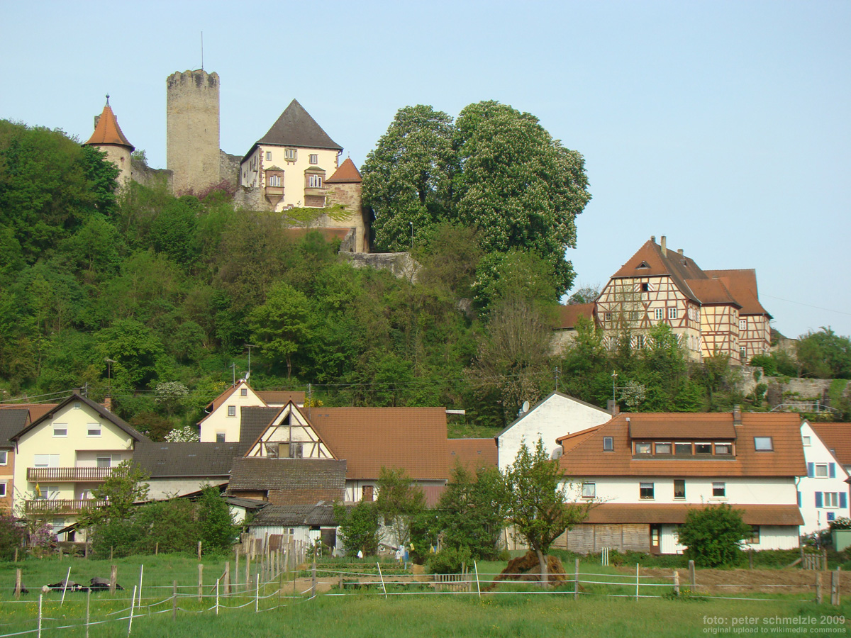 Veste Neidenstein